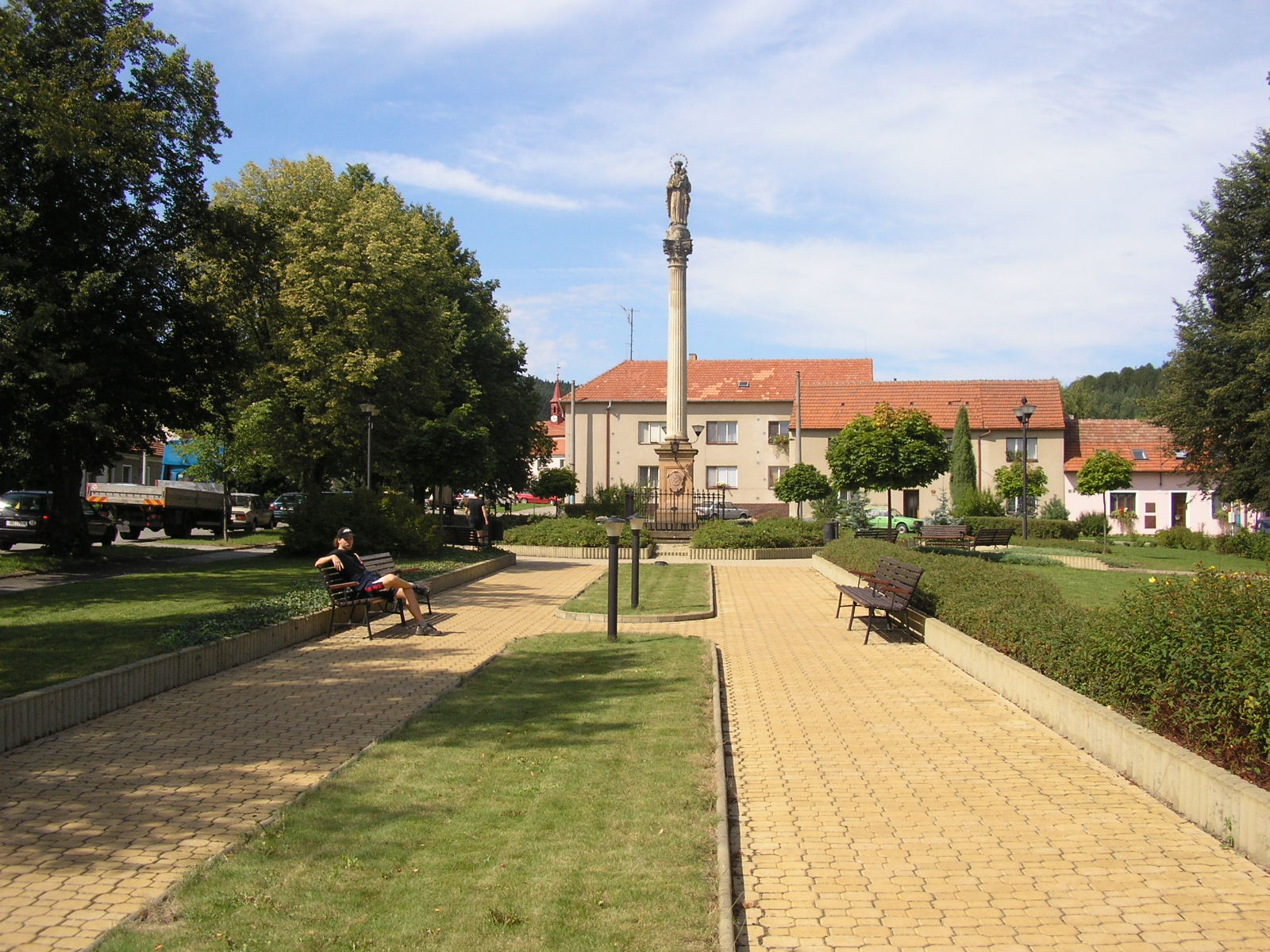 Náměstí Osvobození, v pozadí Socha Panny Marie (Lysice)